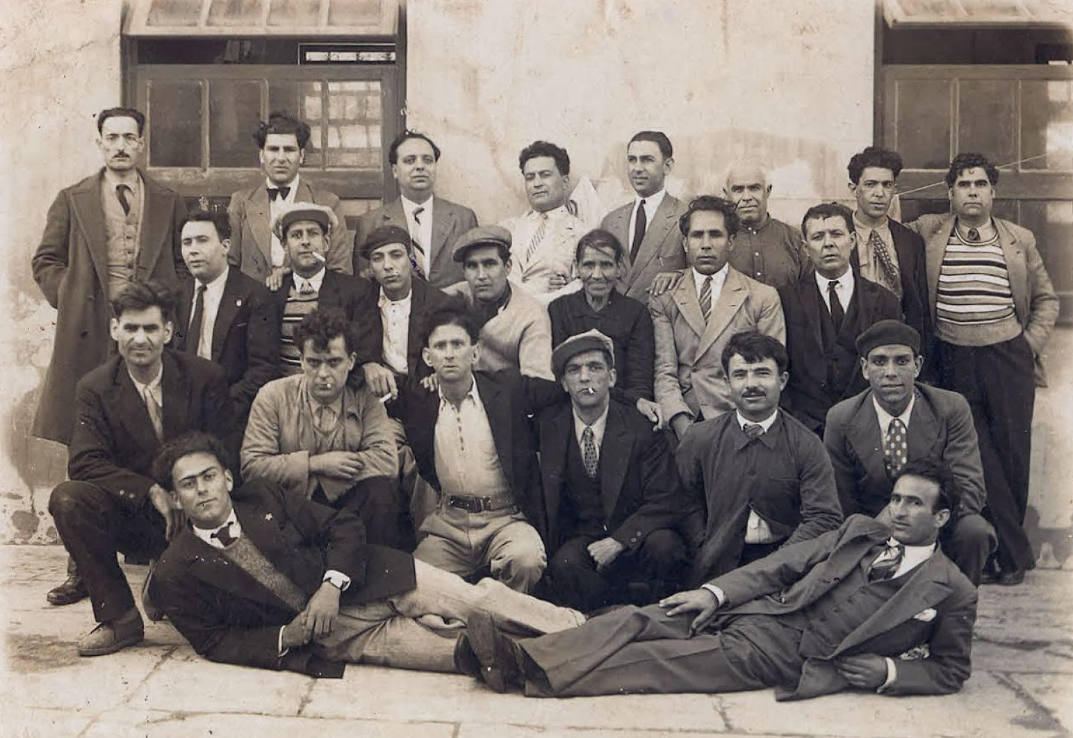 Militantes presos na Fortaleza de Peniche pela sua acção no movimento do 18 de Janeiro de 1934 - [Photographe non identifié. Au verso: "A mon ami (*) Joaquim Montes, j'offre cette photo prise le 25-12-1934 dans la forteresse de Peniche. (signé) José Bernardo ". (Note de JF: Mort à Tarrafal). Addendum au verso, colonne de droite (autographe JF): "Militants arrêtés à Peniche pour leur action le 18 janvier 1934].